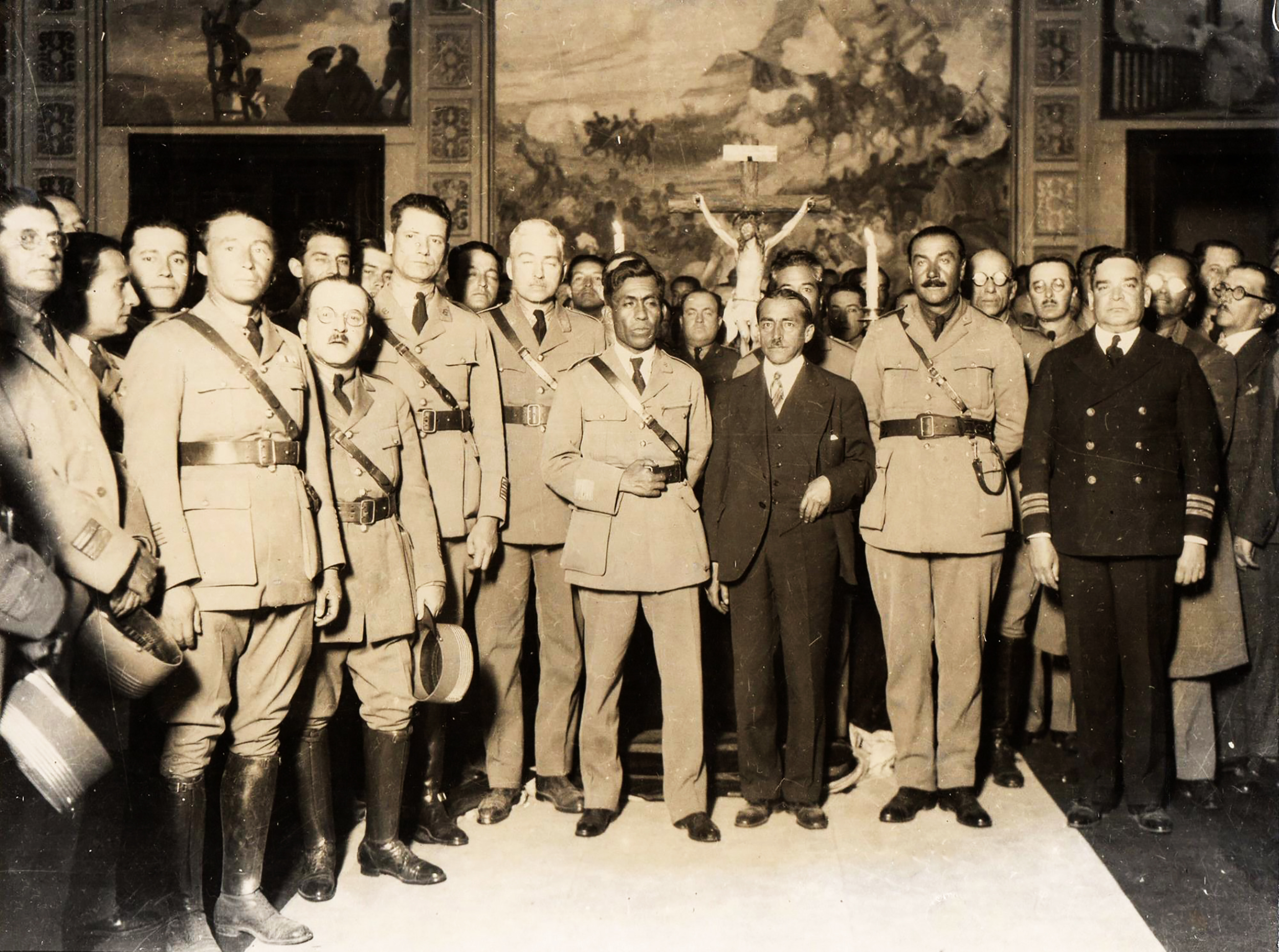 Sánchez Cerro en el día de su juramentación como presidente de la Junta de Gobierno de 1930. A su lado aparece Gustavo Jiménez, vestido de civil, que fue su ministro de gobierno.